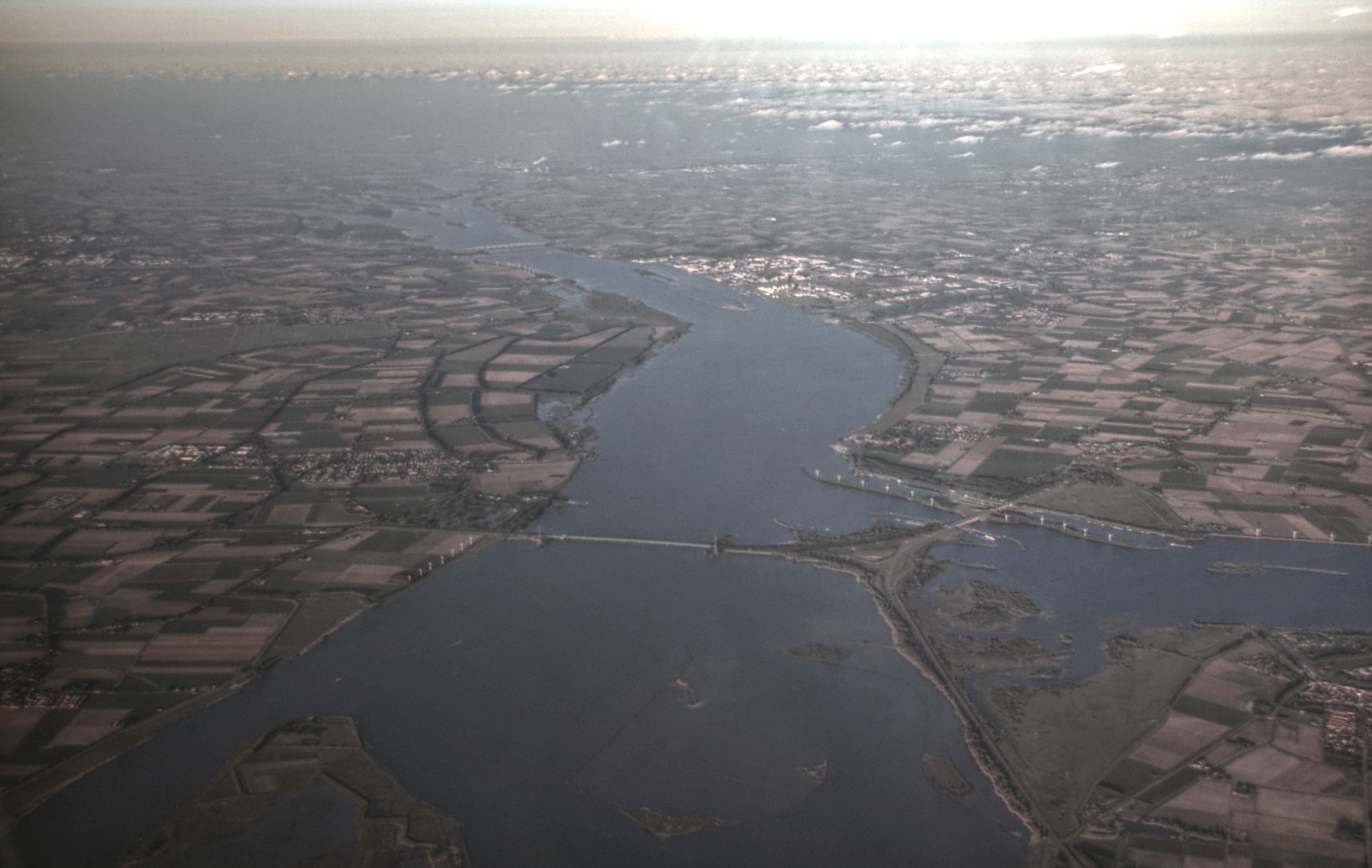 Uitzicht op de Haringvlietbrug, gezien naar het Oosten. Mei 2013